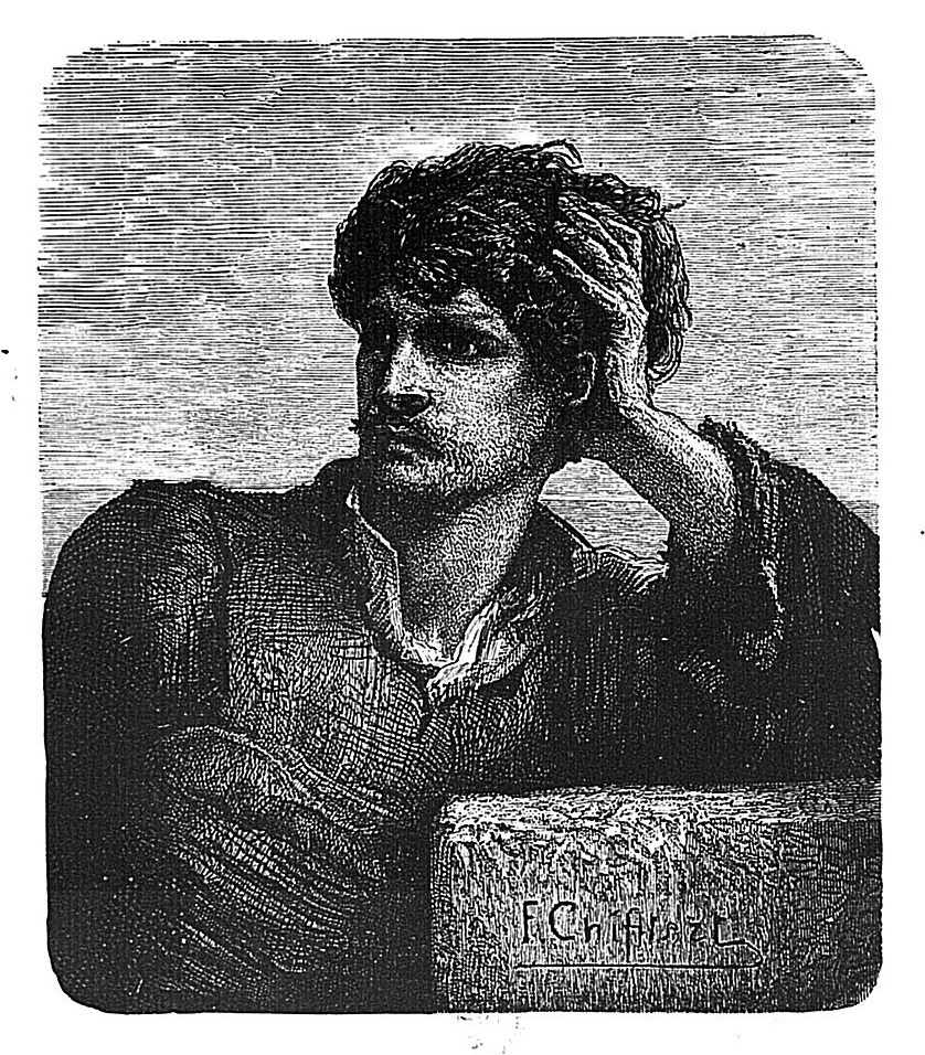 Gilliatt le malin — Illustration pour Les Travailleurs de la mer — Éditions E. Hugues 1883 (Paris )